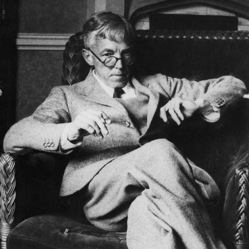 Photographie von Godfrey Harold Hardy (1877-1947) in seiner Blütezeit. "Um so sitzen zu können, muß man in einer Public School erzogen worden sein." [Public School = privates Internat]. Quelle unbekannt. Siehe auch: Robert Kanigel: Der das Unendliche Kannte. Das Leben des genialen Mathematikers Srinivasa Ramanujan. Vieweg, 2.Aufl.1995, S.240.